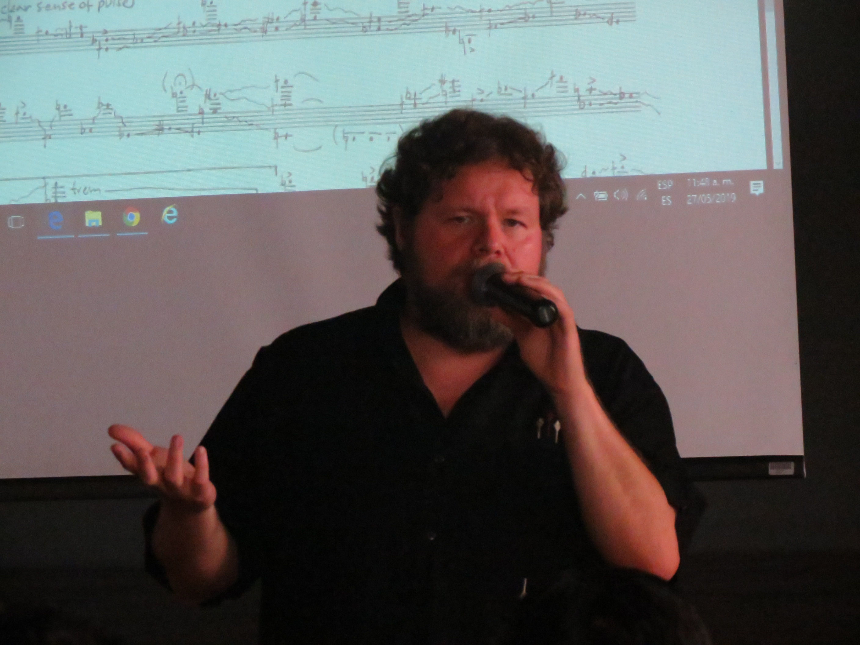 Conferencia de Wilfrido Terrazas en la Cátedra Alfonso Moreno (2019) del Departamento de Música de la Universidad Autónoma de Aguascalientes.